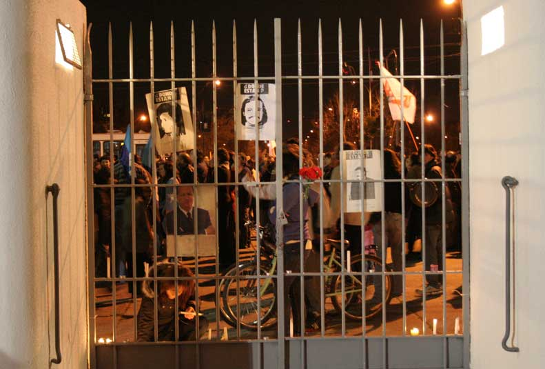 Interior de la Escotilla Nº8. Estadio Nacional. Chile.